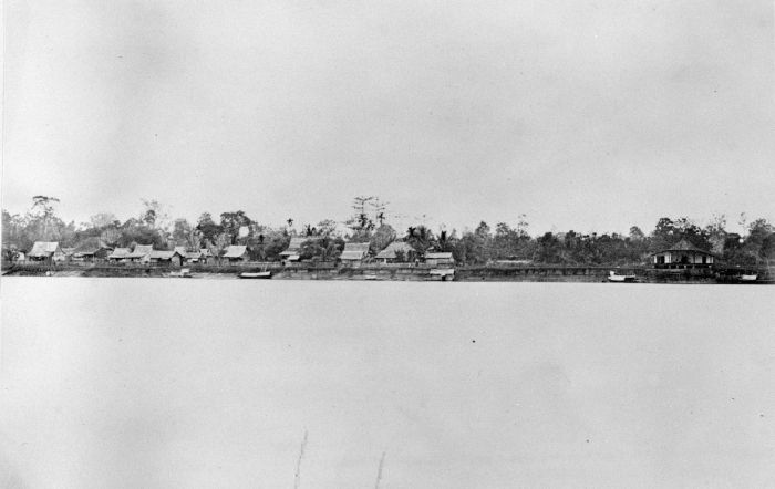 Foto. Deze foto is gemaakt tijdens de Sumatra Expeditie van 1877-1879. Landschappen en oudheden uit Djambi.. Kampong Moeara Kompeh in de residentie Djambi, Sumatra